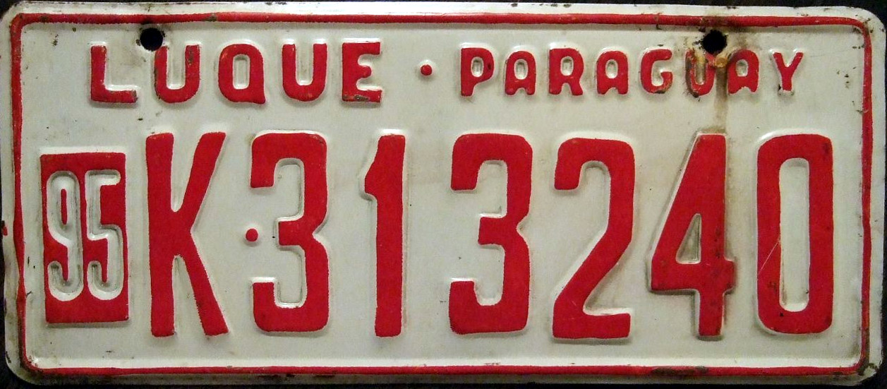 PARAGUAY Luque 1995 passenger